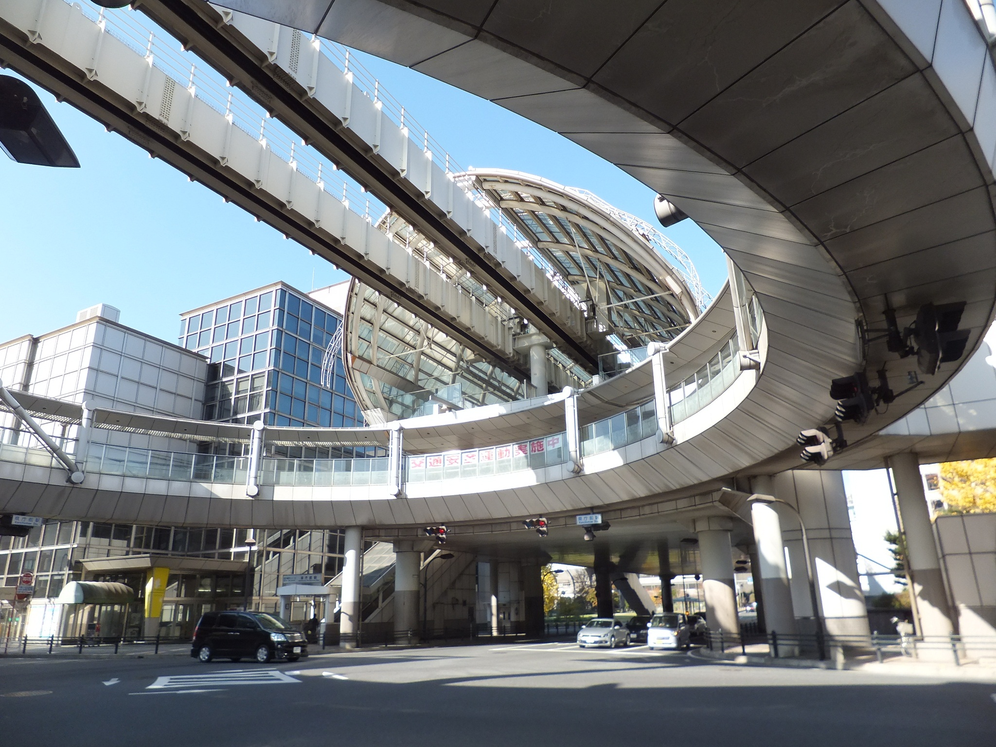 千葉都市モノレール県庁前駅